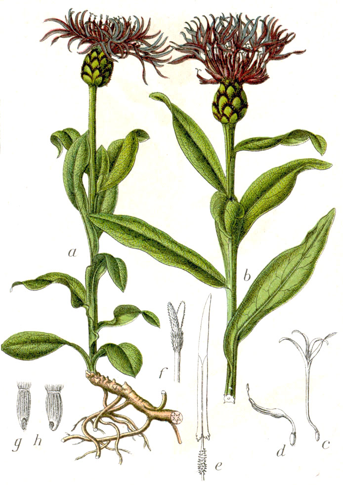 Centaurea montana L. s. l. Original Caption Gemeine Bergcyane, Centaurea montana